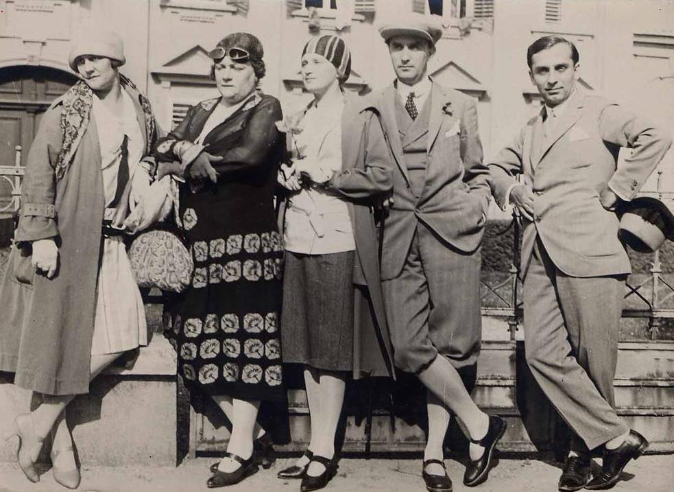 A Nemzeti Színház művészei az országos turné szombathelyi állomásán: Mátray Erzsi, Vízváry Mariska, Ághy Erzsi, Uray Tivadar, Forgách Sándor